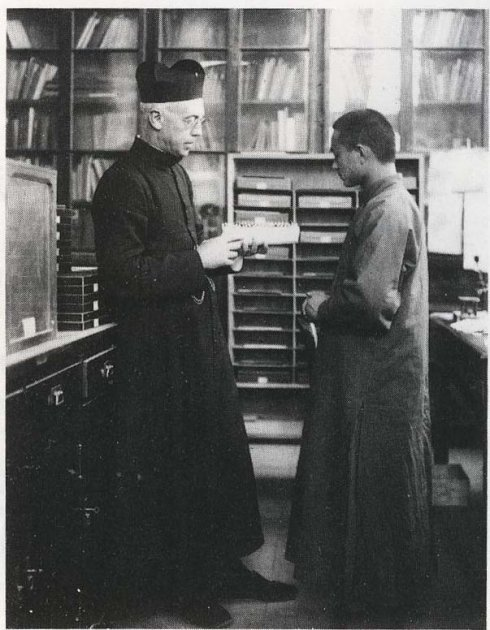 中文（中国大陆）: 桑志华在北疆博物院整理昆虫标本